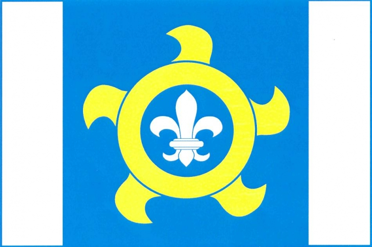 Vlajka, Čejetice, okres Strakonice